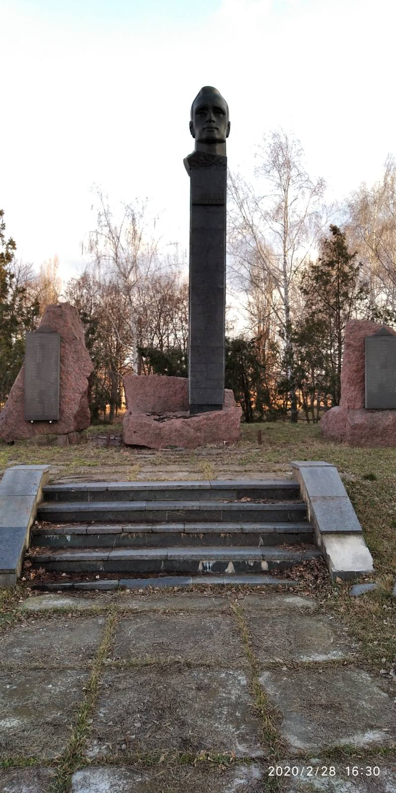 село Дубинове, Савранський район, Одеська область